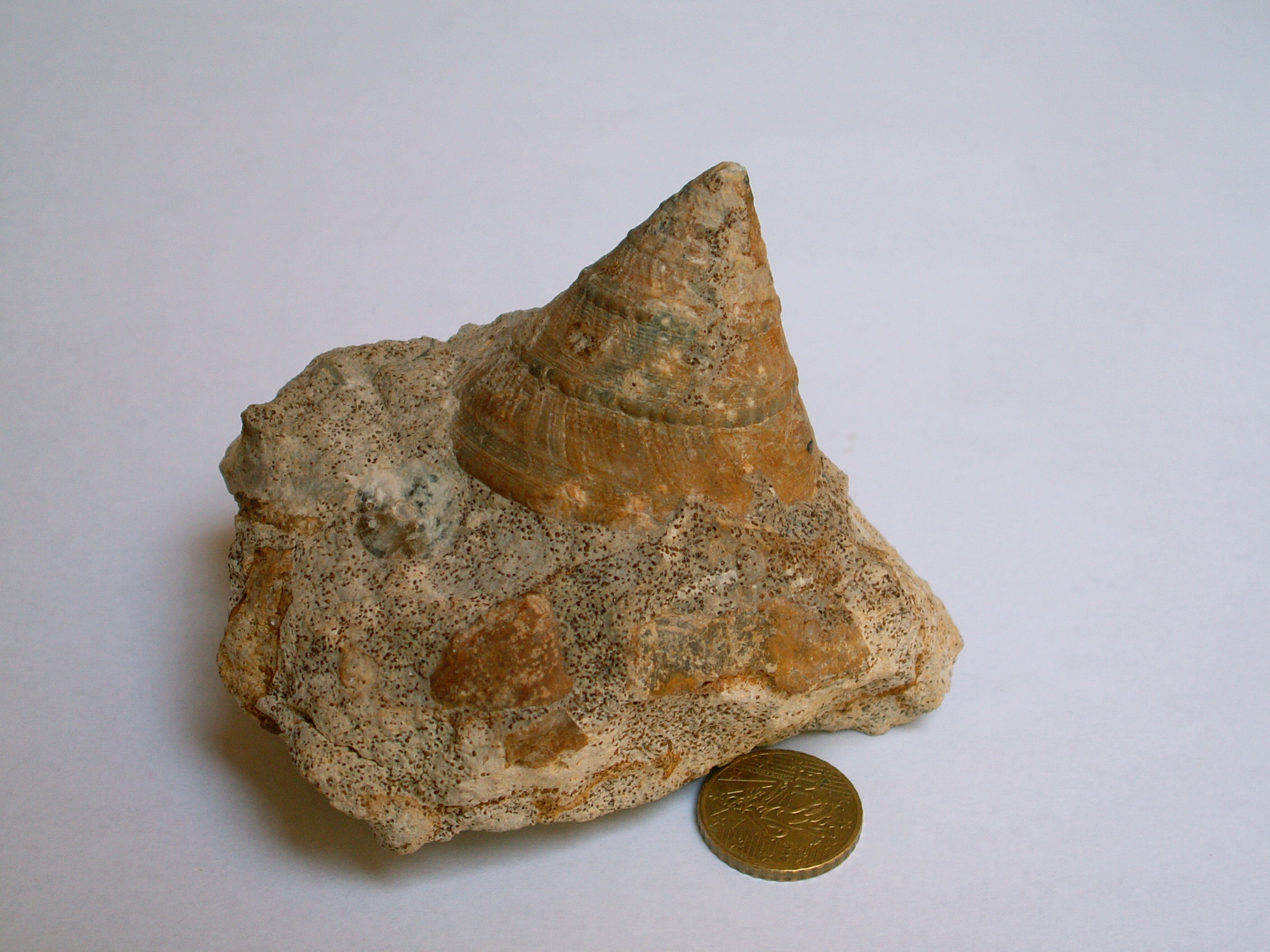 Photo d'un Pyrgotrochus sp., Gastéropode. Prélevé sur un chantier près de Ouistreham (Calvados). Provenance exacte inconnue (remblais allochtone ?) probablement du Calvados.